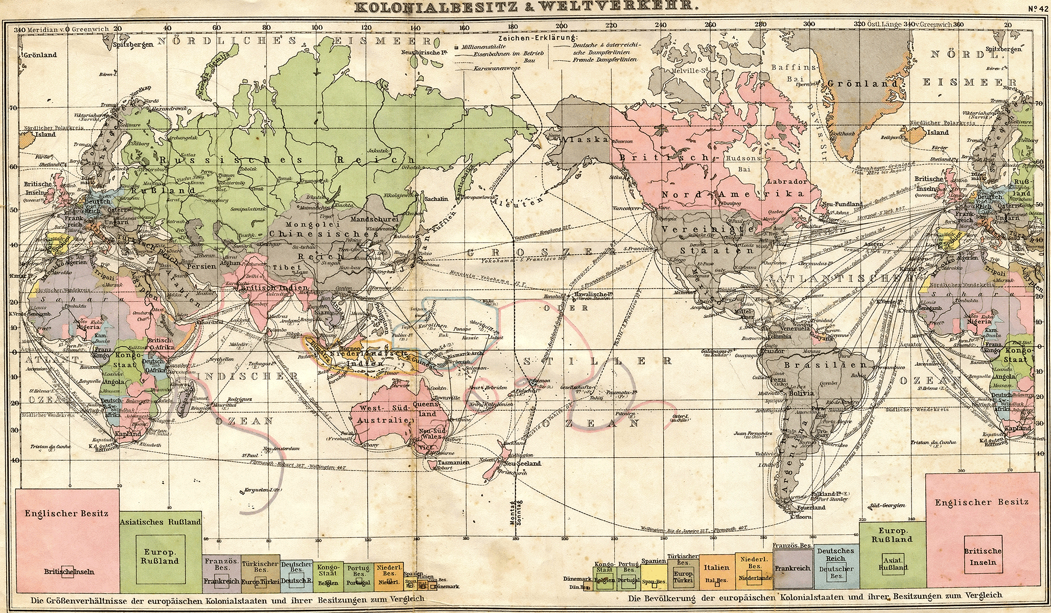 Colonial Empires